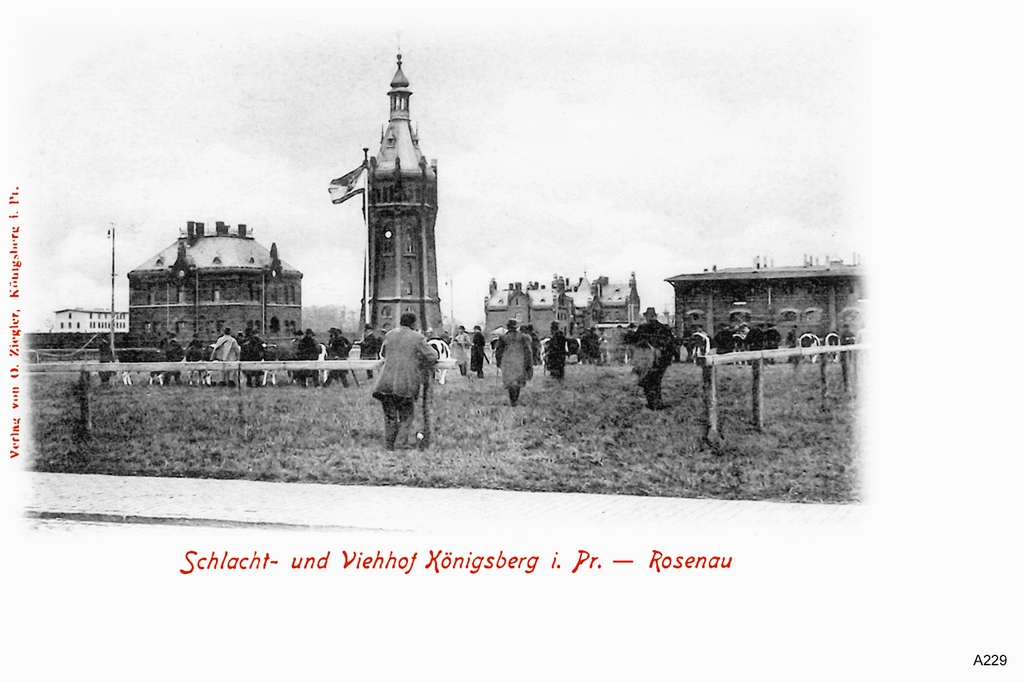 Königsberg (Ostpreußen), städtischer Schlacht- und Viehhof im Stadtteil Rosenau, erbaut 1885